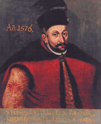 Беларуская (тарашкевіца): Стэфан Баторы